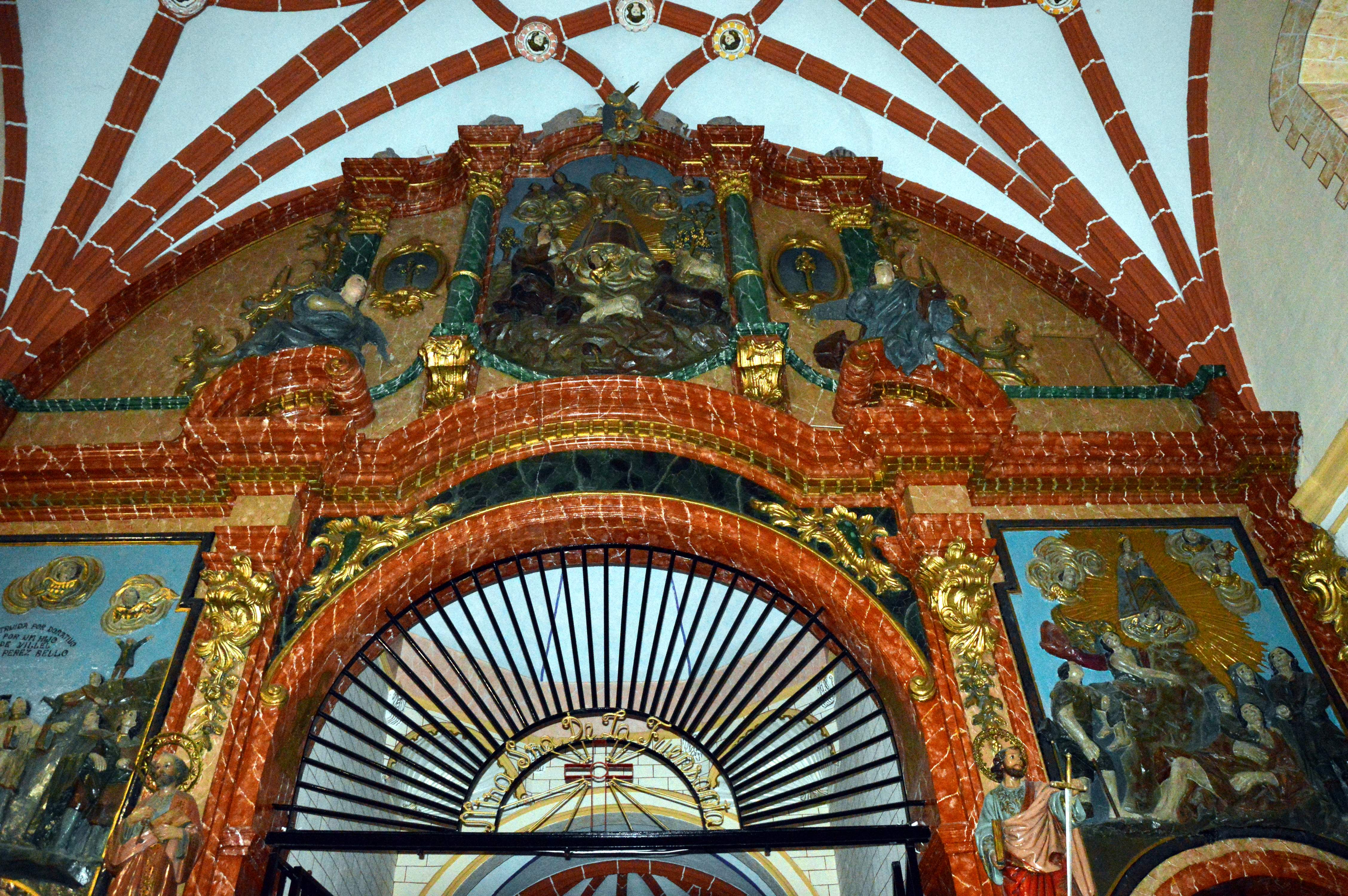 Santuario de la Fuensanta en Villel (Teruel), detalle del frontis barroco del presbiterio (2019)